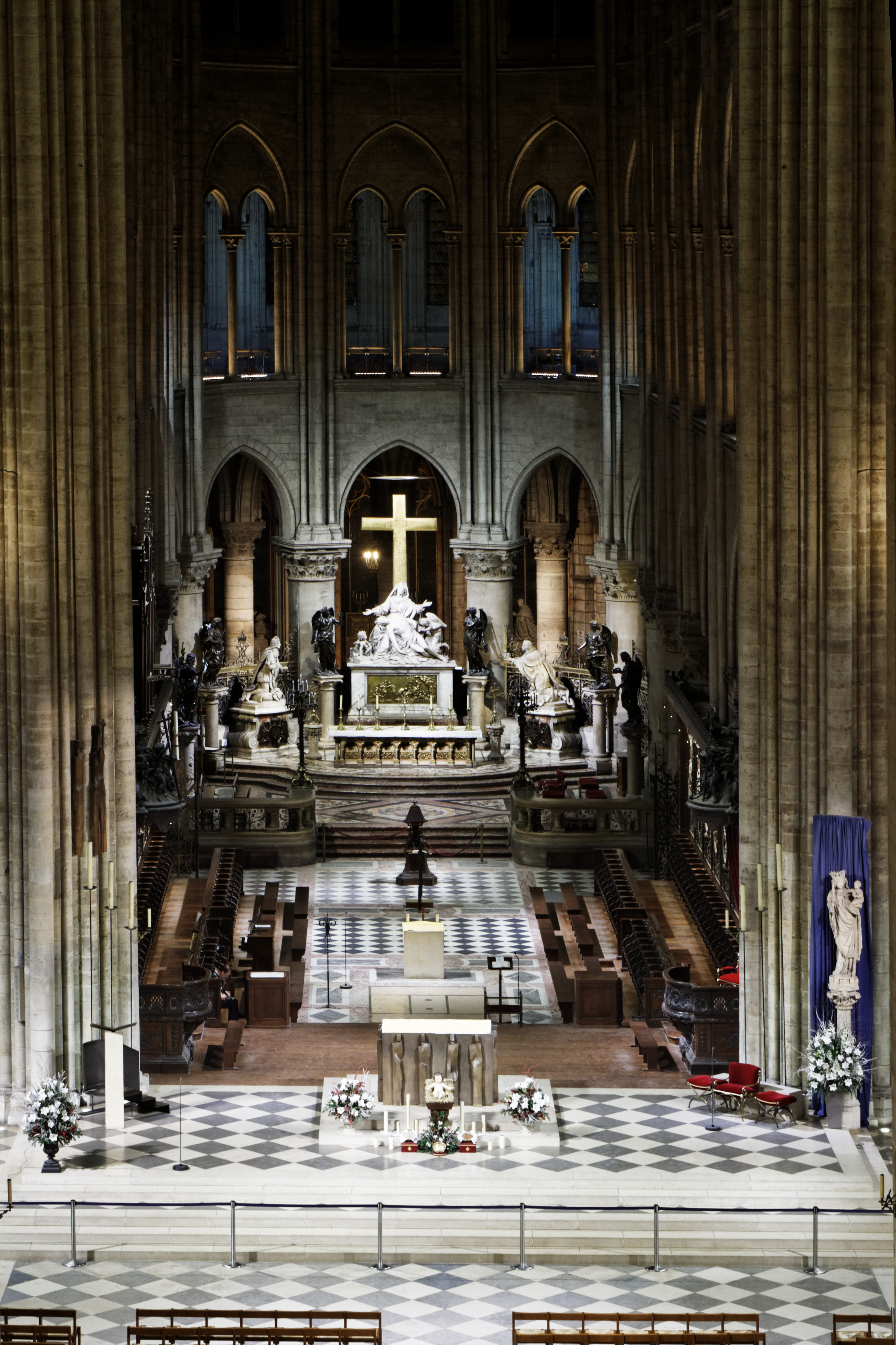 Présentation du tapis monumental de choeur de la cathédrale Notre-Dame de Paris. Il a été tissé de 1825 à 1833 par la manufacture de la Savonnerie